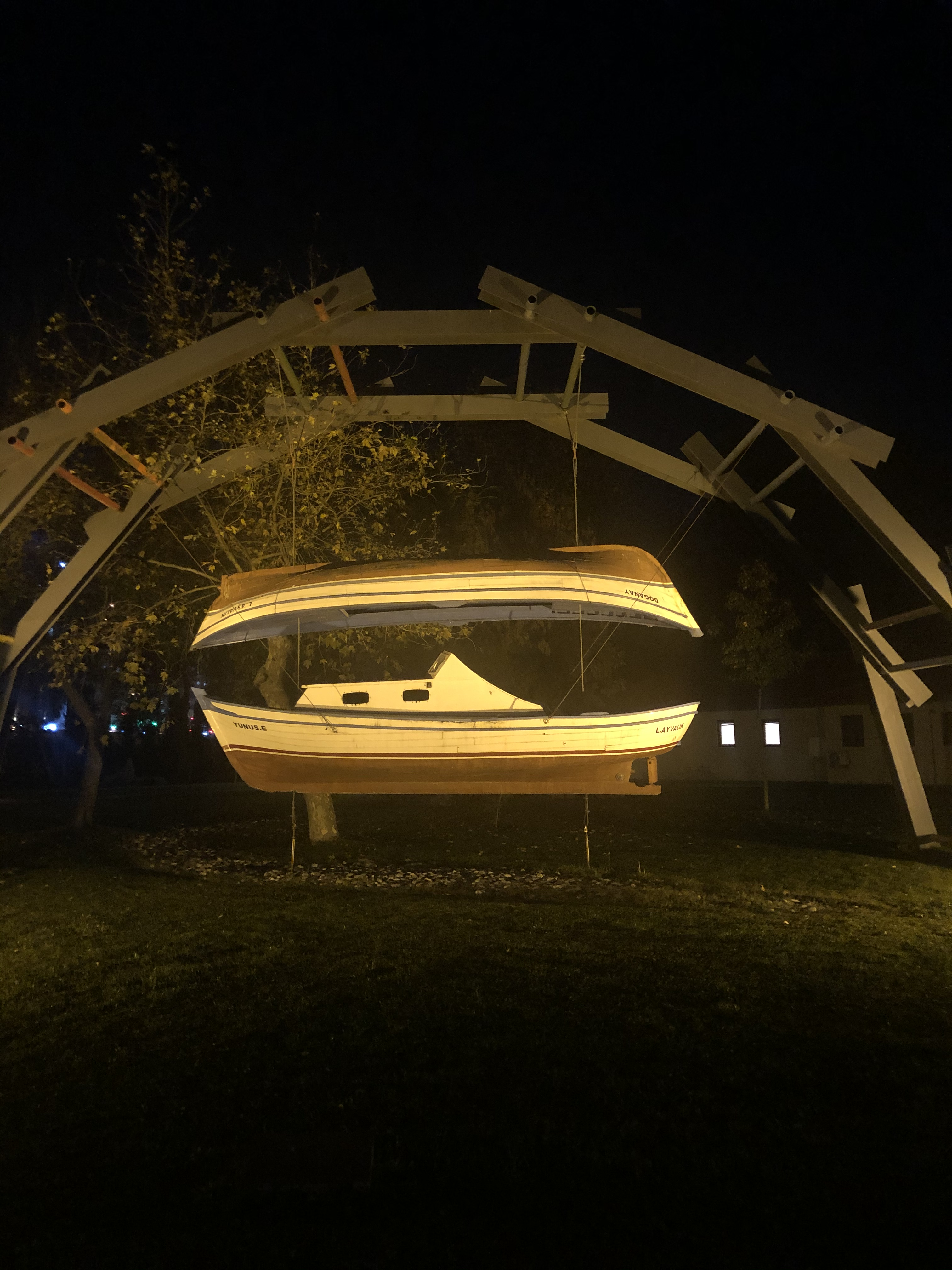 Bilgi Üniversitesi SantralIstanbul kampüsünün içerisinde akşam saatlerinde çekilmiş bir görsel